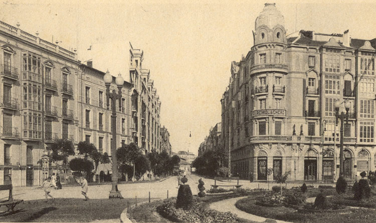 Calle de Miguel Íscar - Valladolid - Ediciones M. Arribas. Apartado 190. Zaragoza / Sello Postales antiguas. Almirante, 23. Tl. 419 46 64. Madrid. Texto manuscrito en reverso - Tarjeta postal 140 x 90 B/N